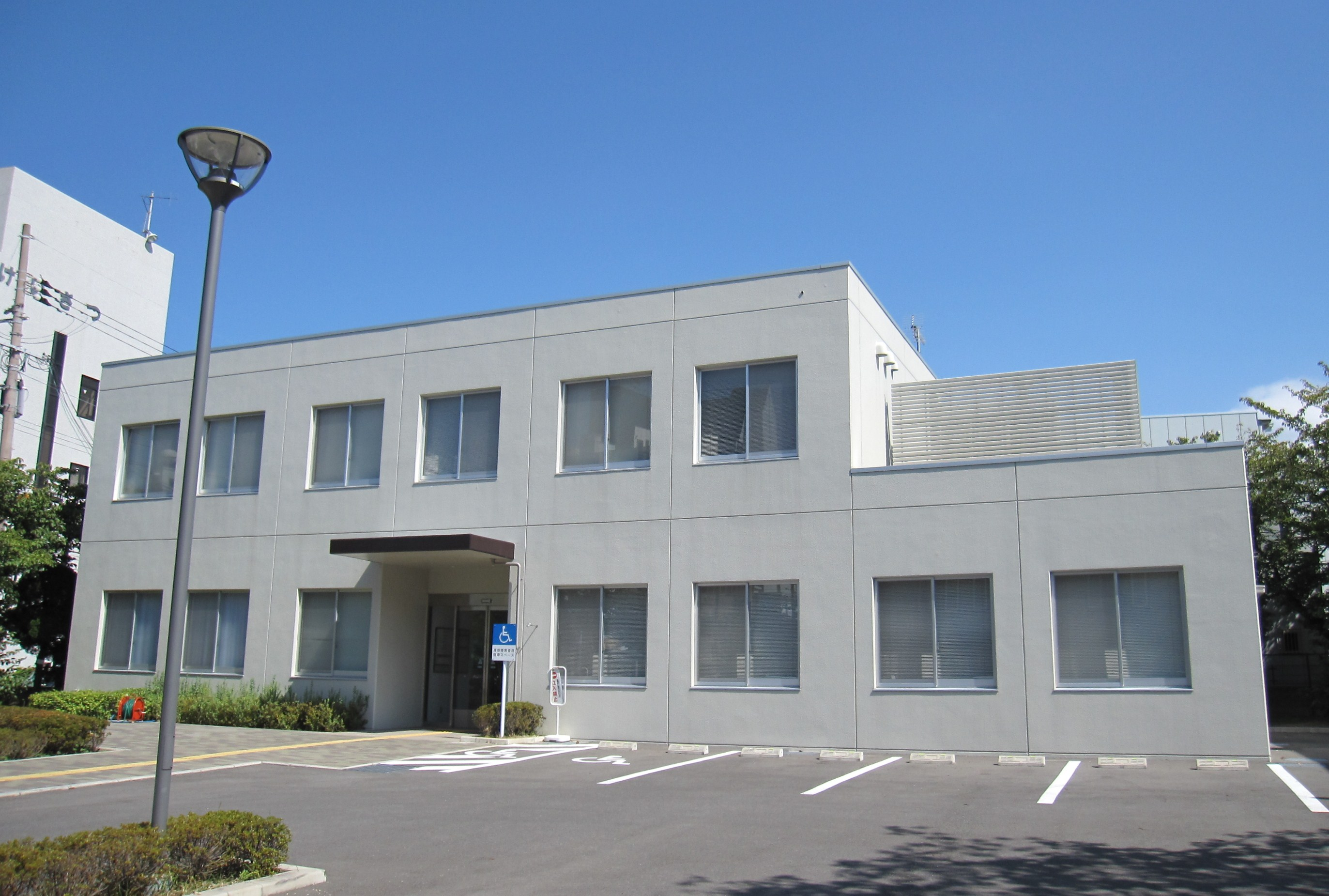 佐野簡易裁判所